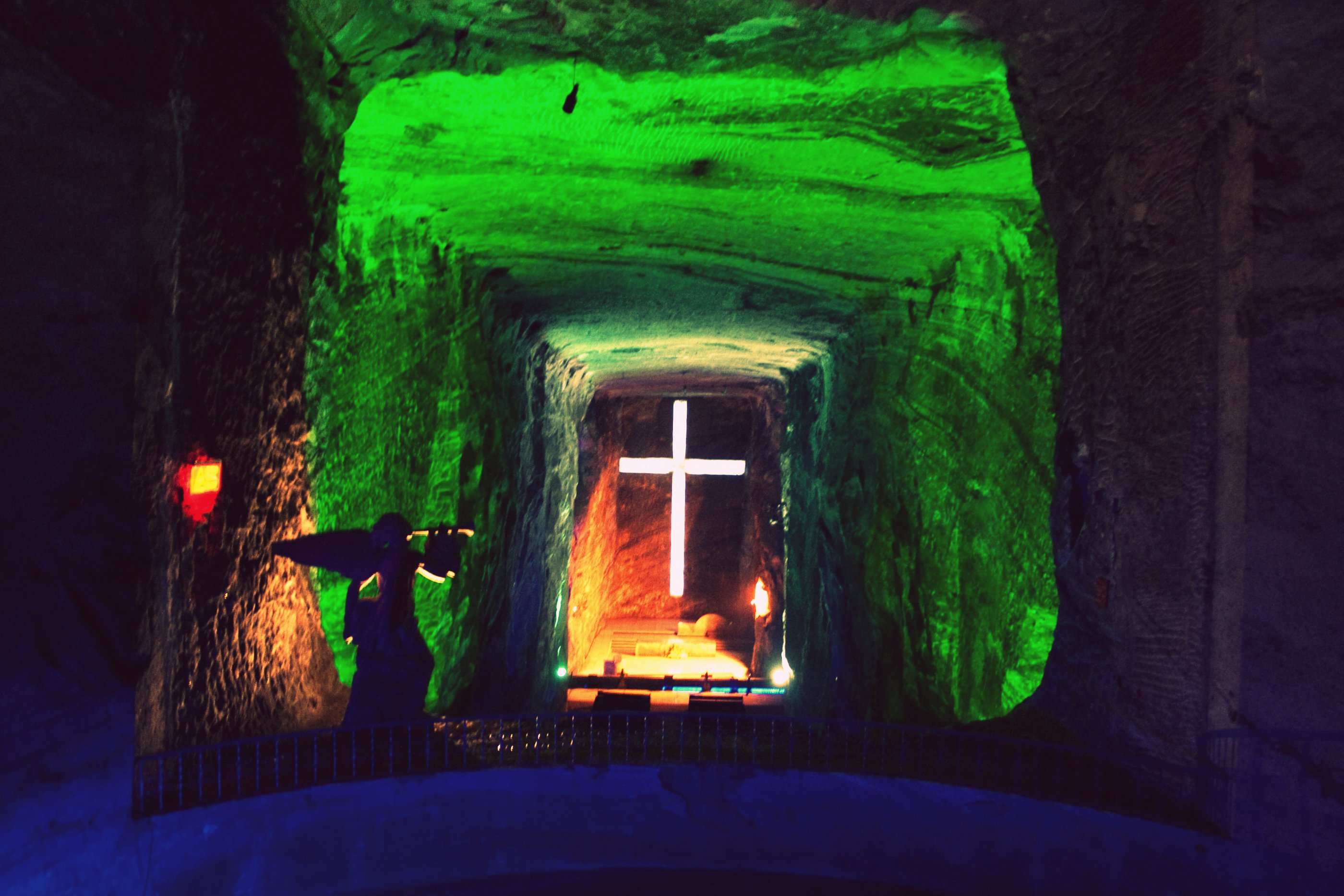 [ En Zipaquirá - Cundinamarca, Colombia - un sábado... ]